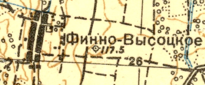 Топографическая карта Ленинградской области, квадрат О-35-12-Г (Ропша), деревня Финно-Высоцкое